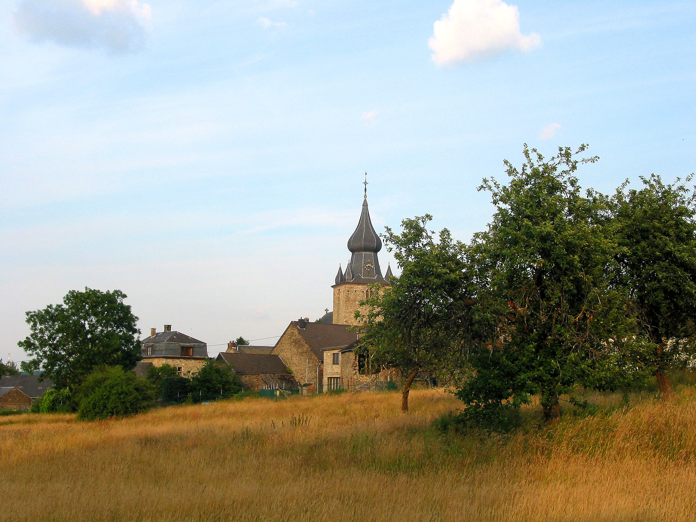 Lierneux, panorama sur le village.